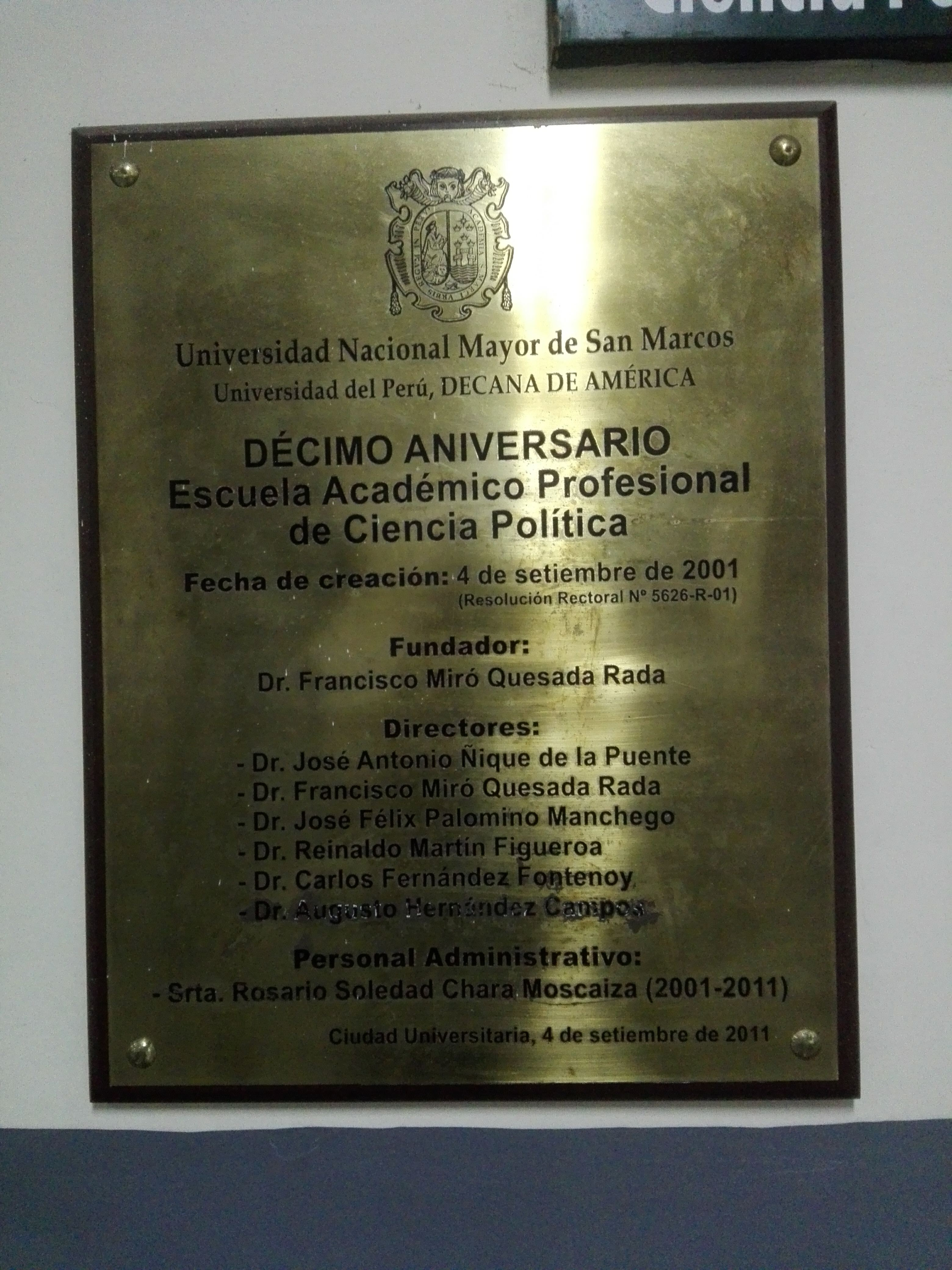 Esta placa se encuentra ubicada en el tercer piso de la FDCP.